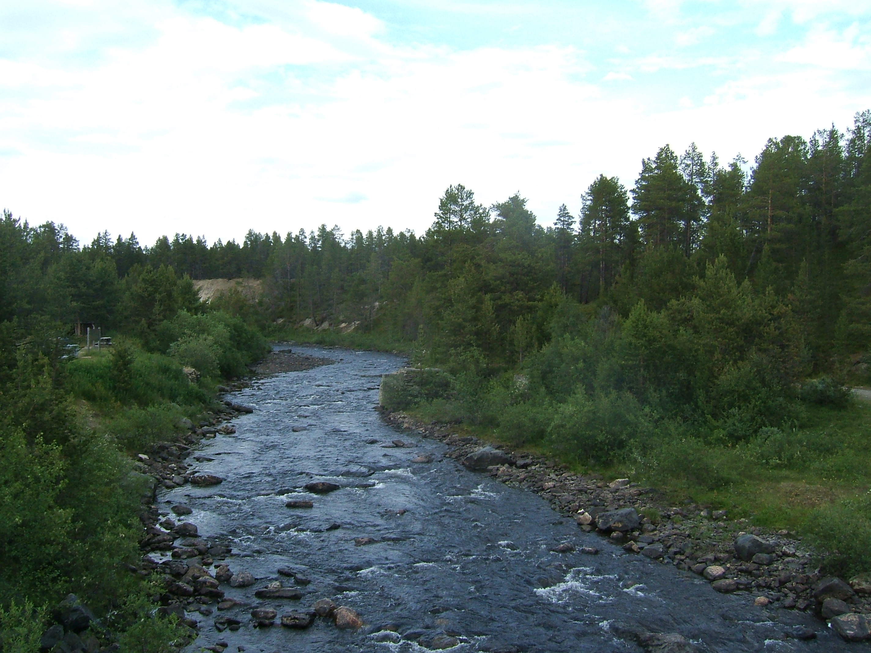 Geaimmejohka at Assebakti